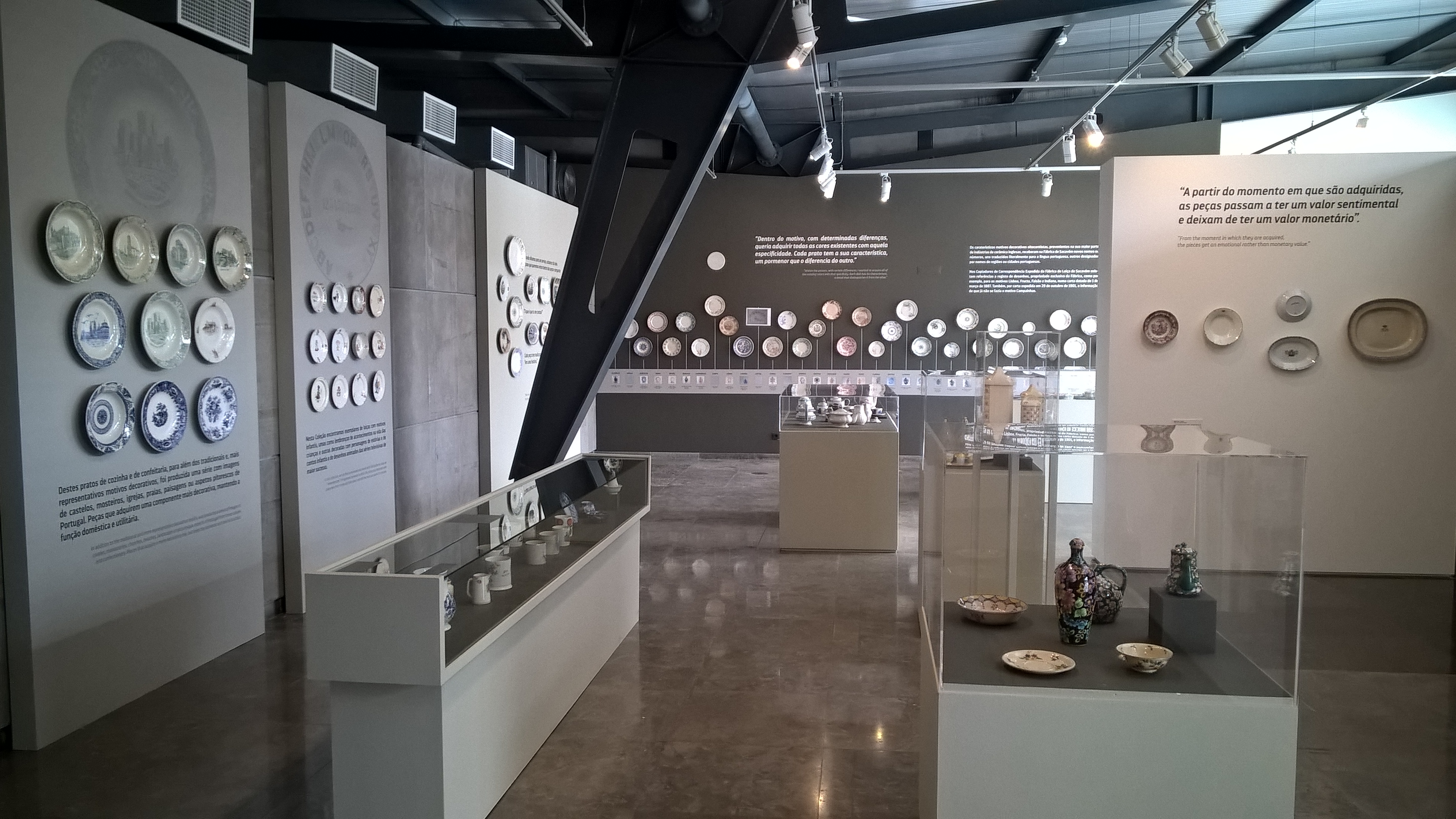 Museu de Cerâmica de Sacavém - Expositores